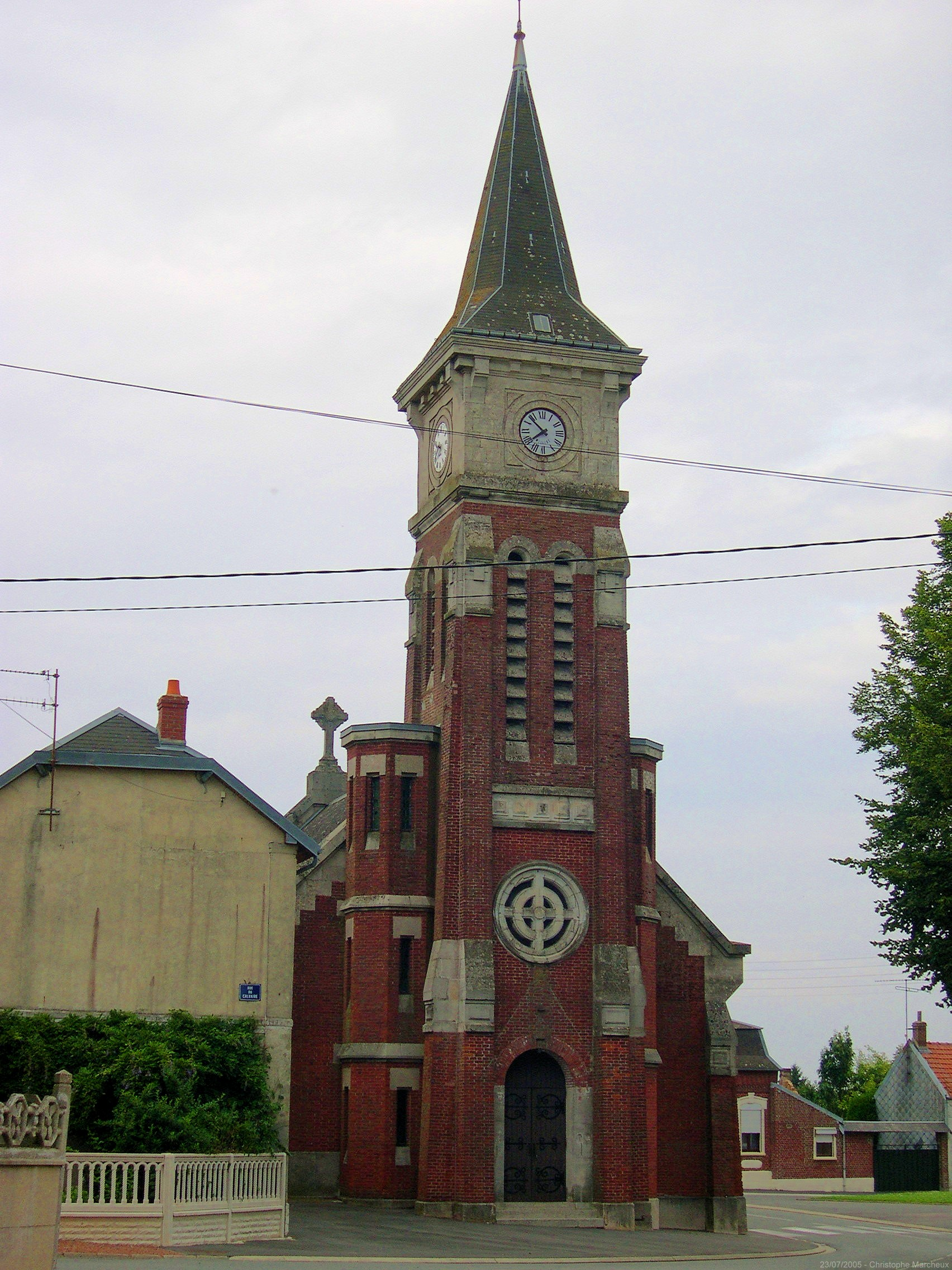 L'Eglise de Gonnelieu. Photographie personnelle, libre de tous droits.